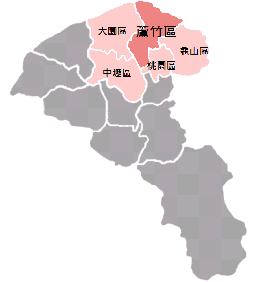 蘆竹區位置圖